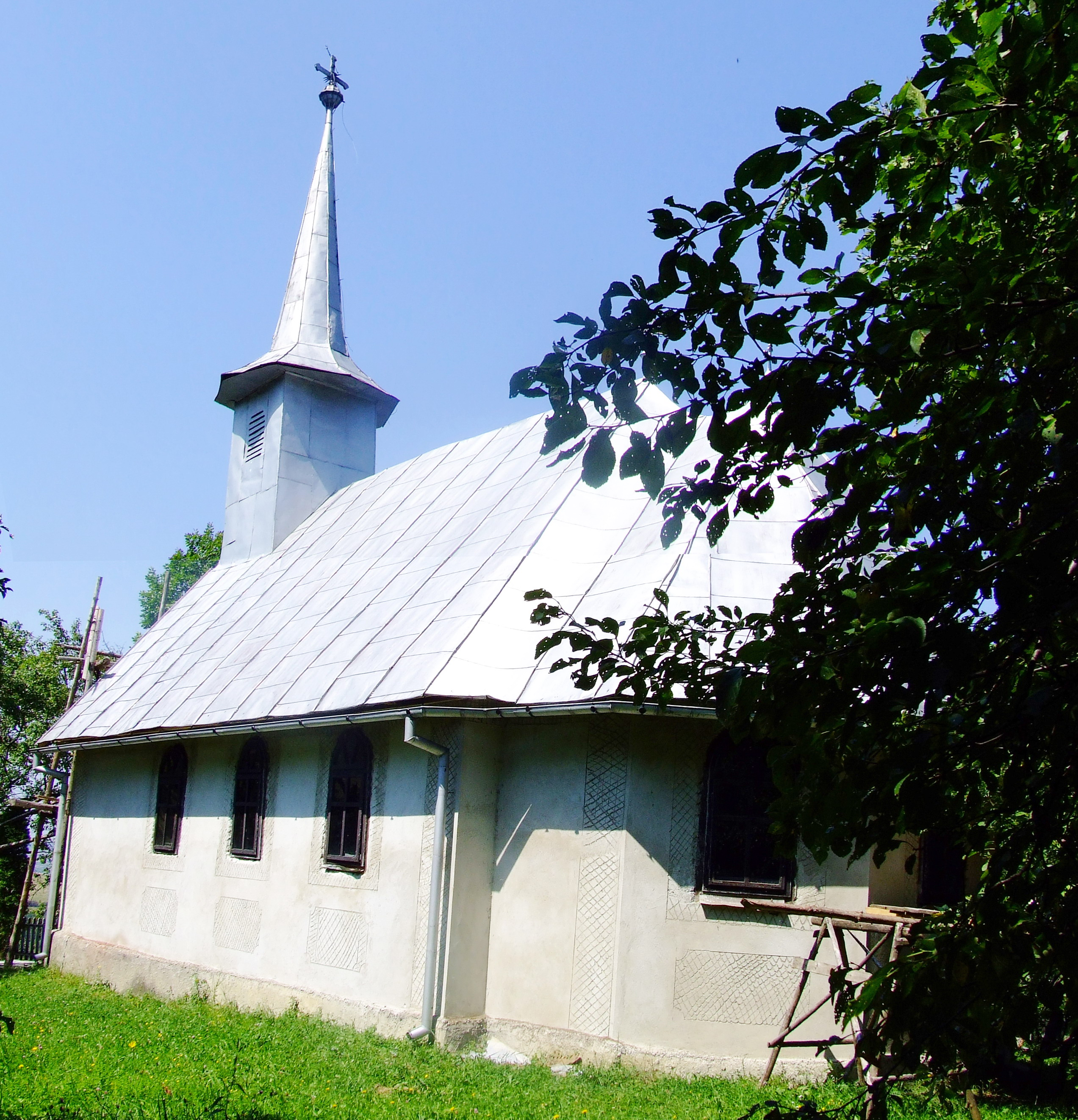 Biserica de lemn din Poiana Onţii, judeţul Sălaj.